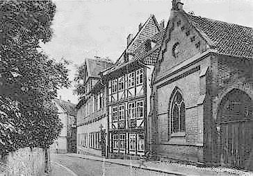 Hildesheim, Klosterstraße, Klein Bethlehem (Kloster und Kinderheim), zerstört am 22. März 1945